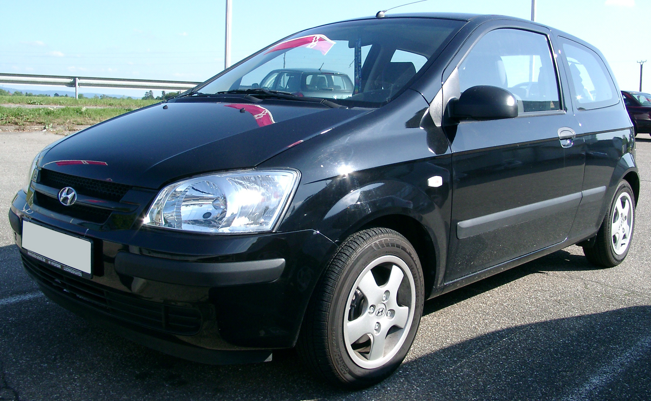 Hyundai Getz